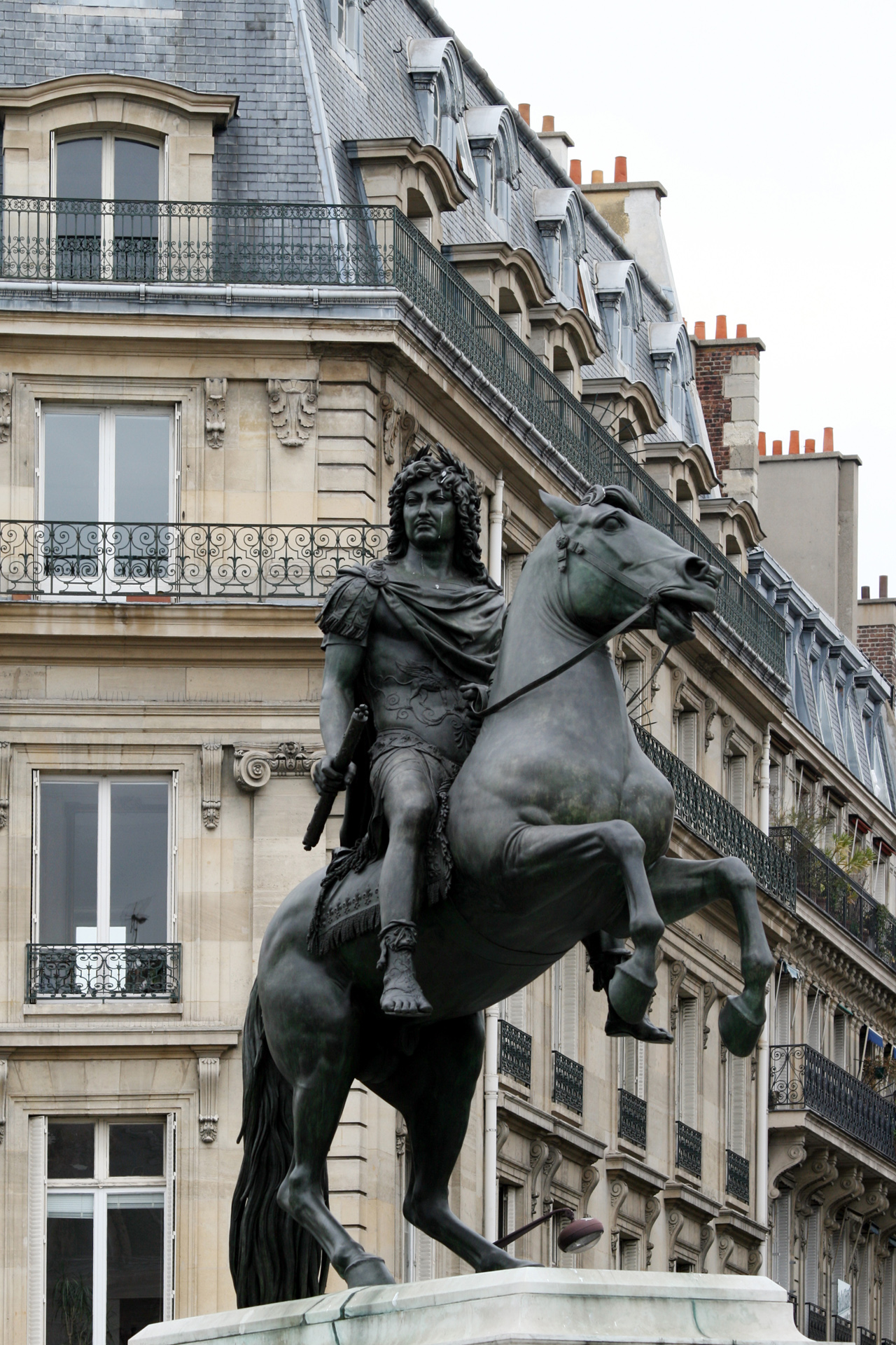 Statue Louis XIV place des Victoires